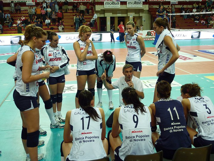 Stagione 2010-11